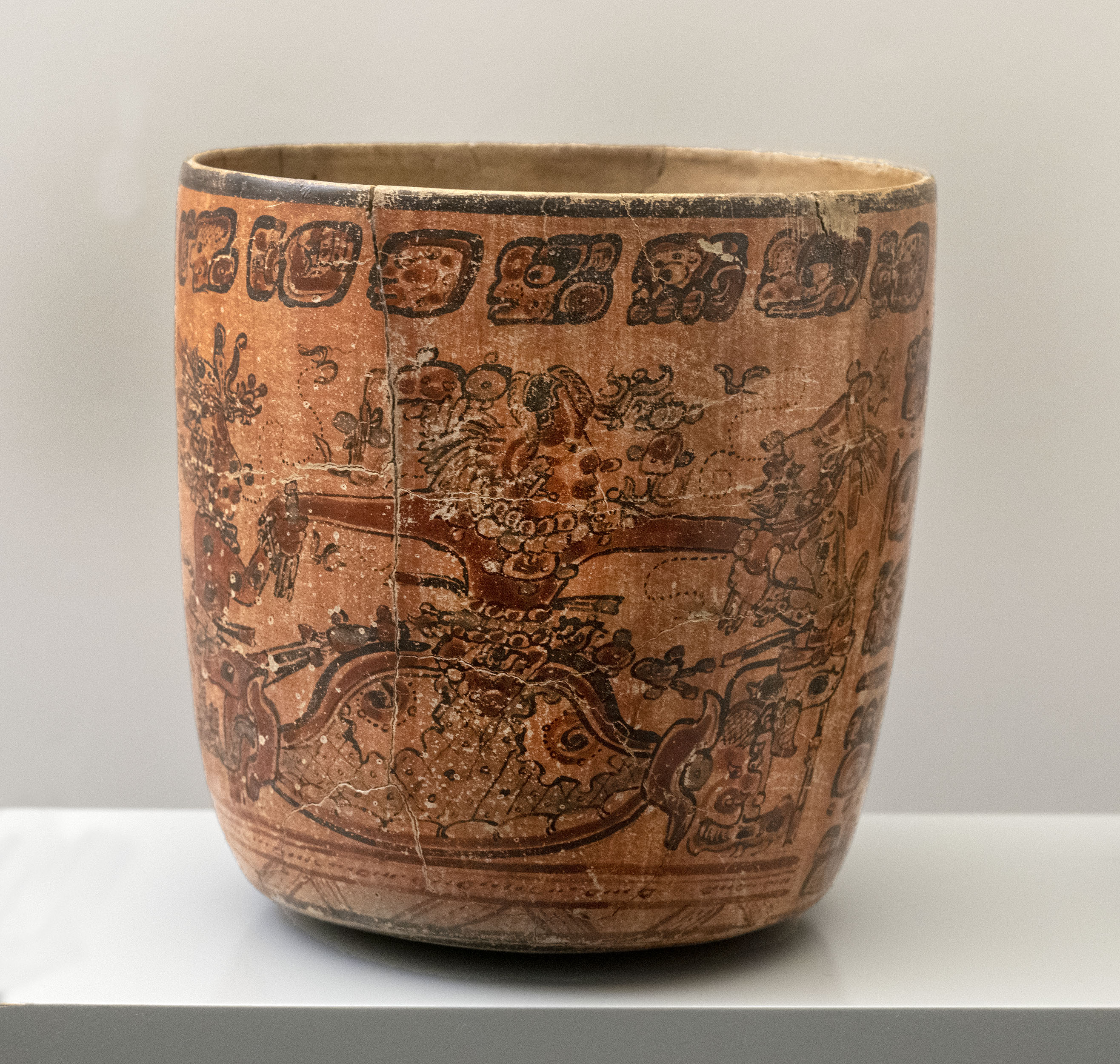 Vaso de cerámica pintada con una banda de glifos y una escena que representa la resurrección de Hun-Hunahpú. Datado en el periodo 600-900 d.C. Cultura maya. Procedente de Guatemala.